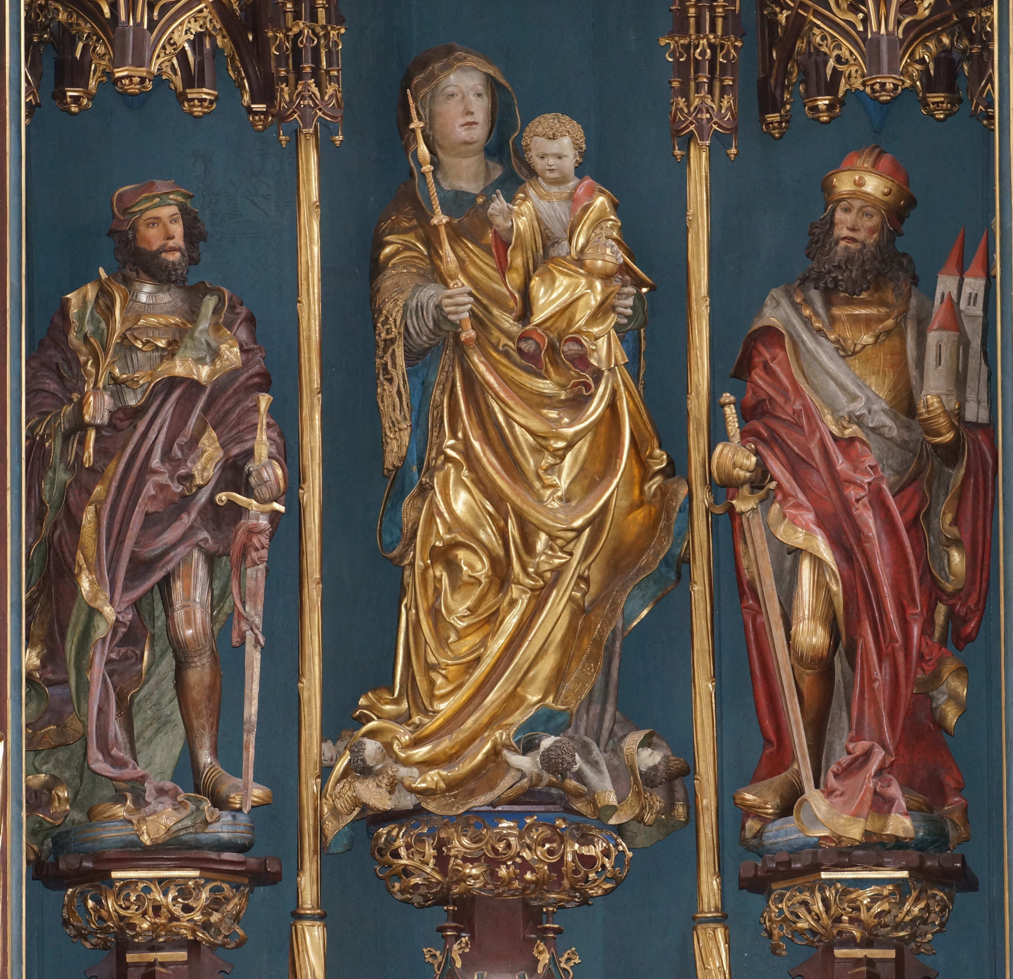 Schreinfiguren des Leinberger-Altars, Mittelschrein im Kastulusmünster von Moosburg an der Isar